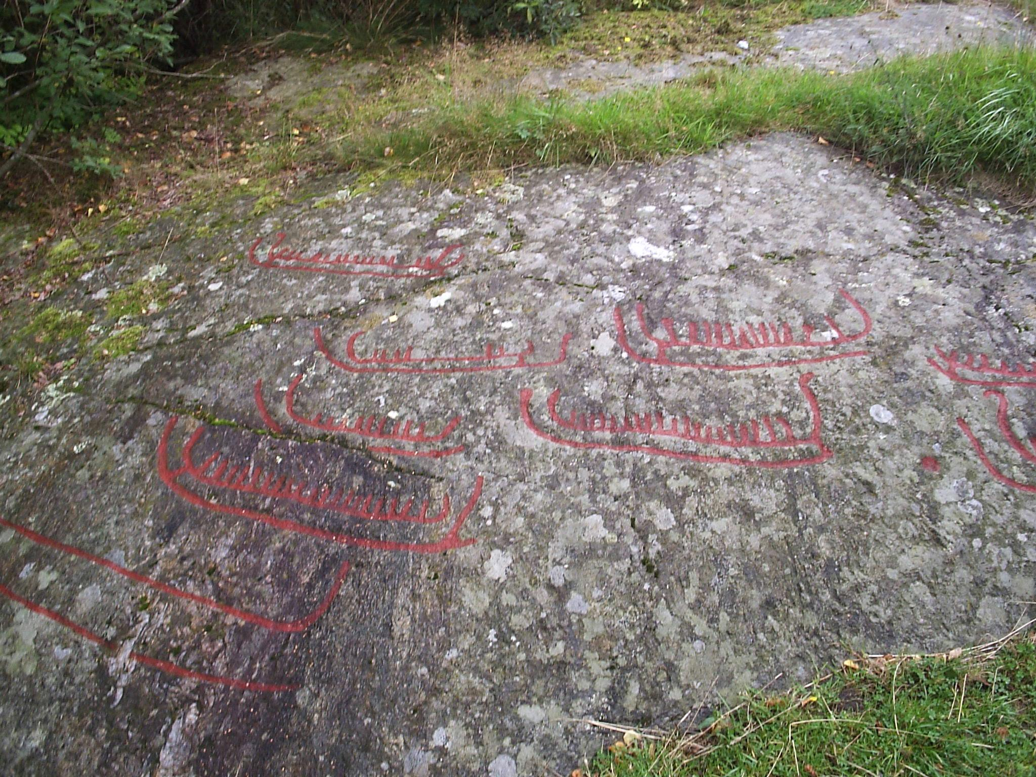 Basteröds hällristningar på Tjörn. Skeppen och skålgroparna är från 1300 till 1100 f Kr. Bilden är fotograferad av Harri Blomberg, den 2 september 2005.